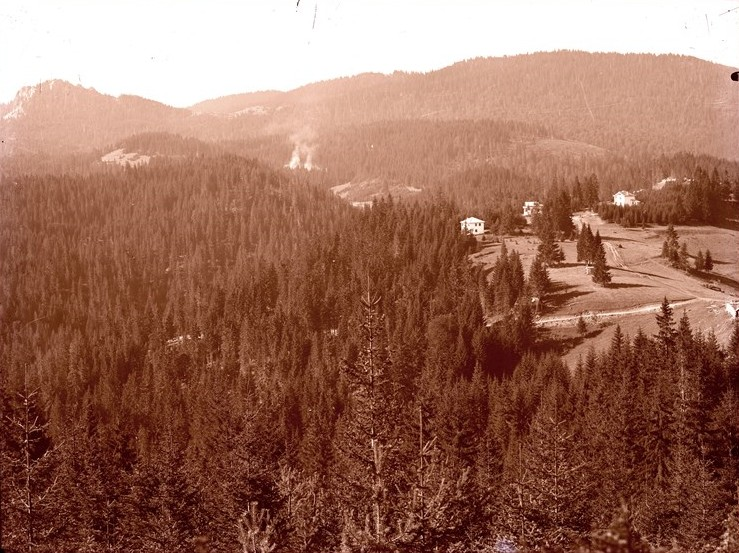 Общ изглед от курорта Пампорово, 1930 г.